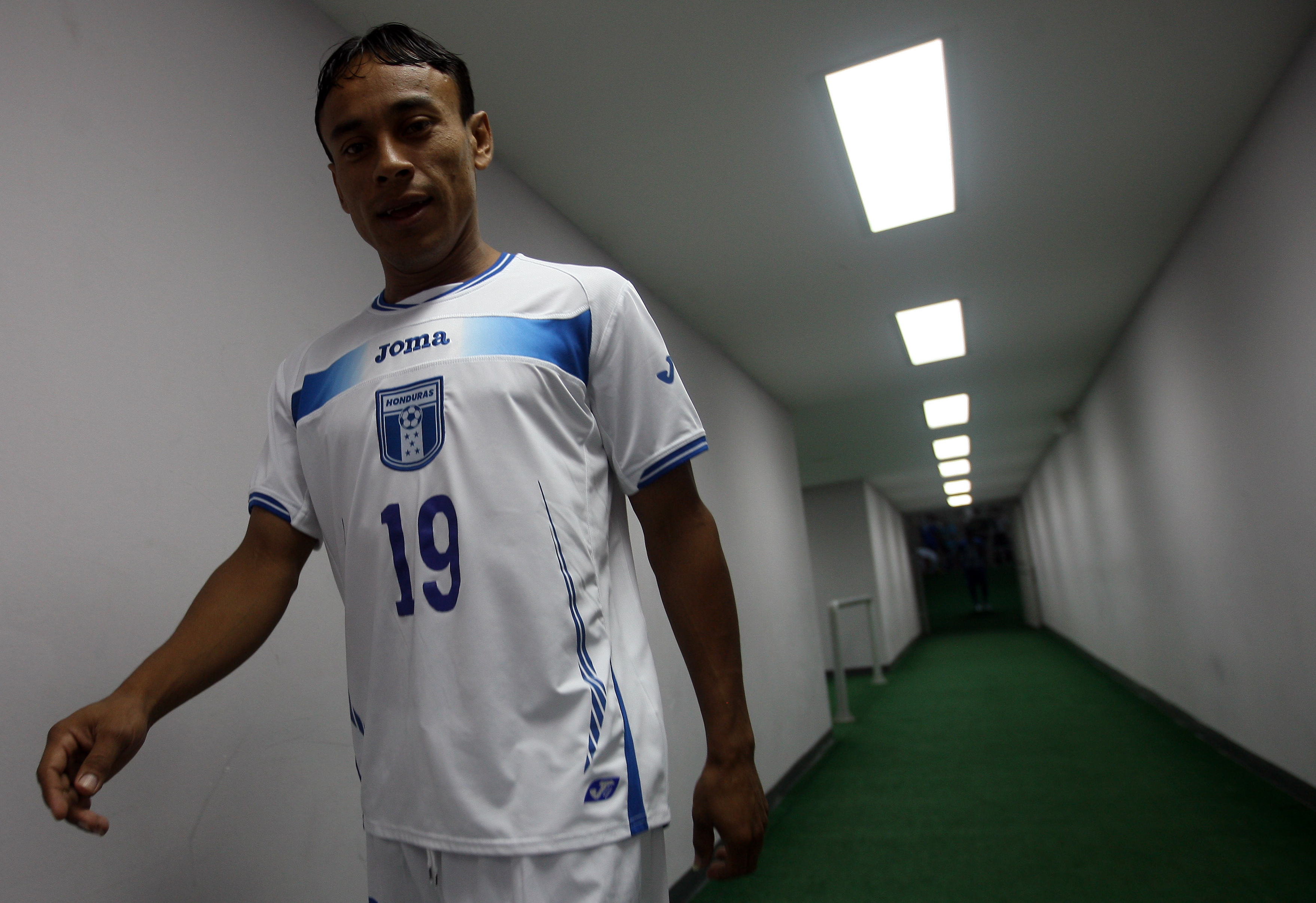 El mediocampista Javier Portillo, seleccionado de Honduras, (Foto Johny Magallanes)